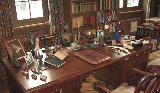 Zürich. Thomas-Mann-Archiv der ETH Zürich, Schönberggasse 15